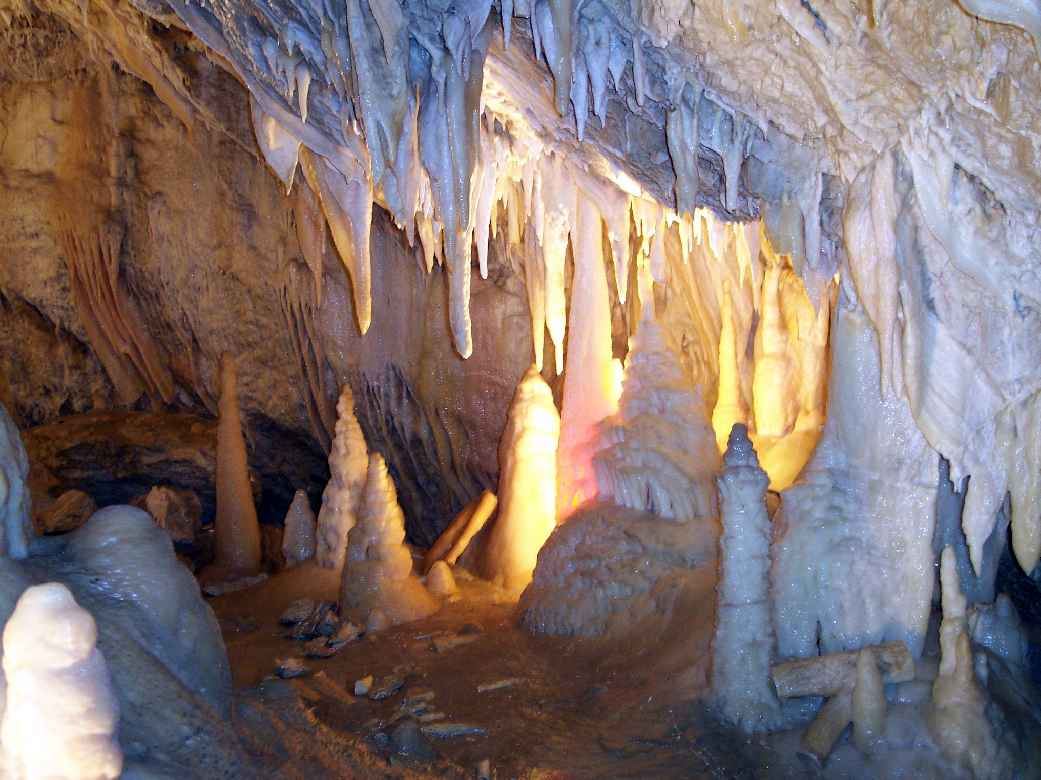 Tropfsteine, Obir-Tropfsteinhöhle in Kärnten